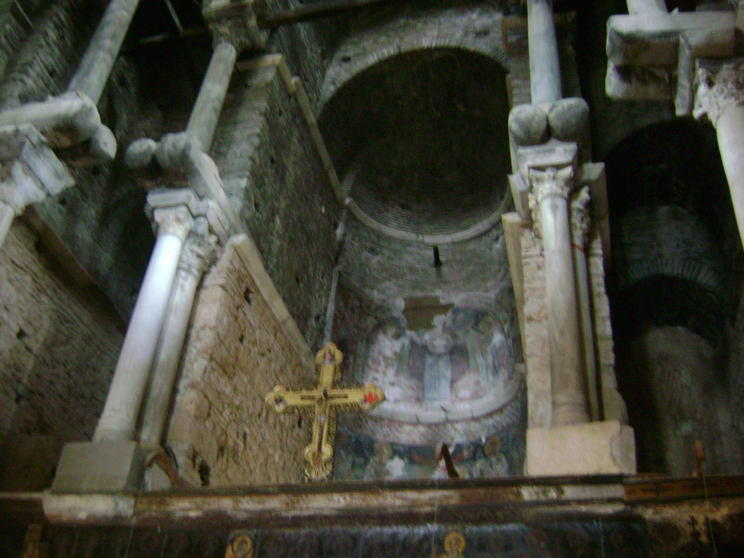 Άρτα, Παρηγορήτισσα, άποψη πάνω απο το Ιερό του Ναού.